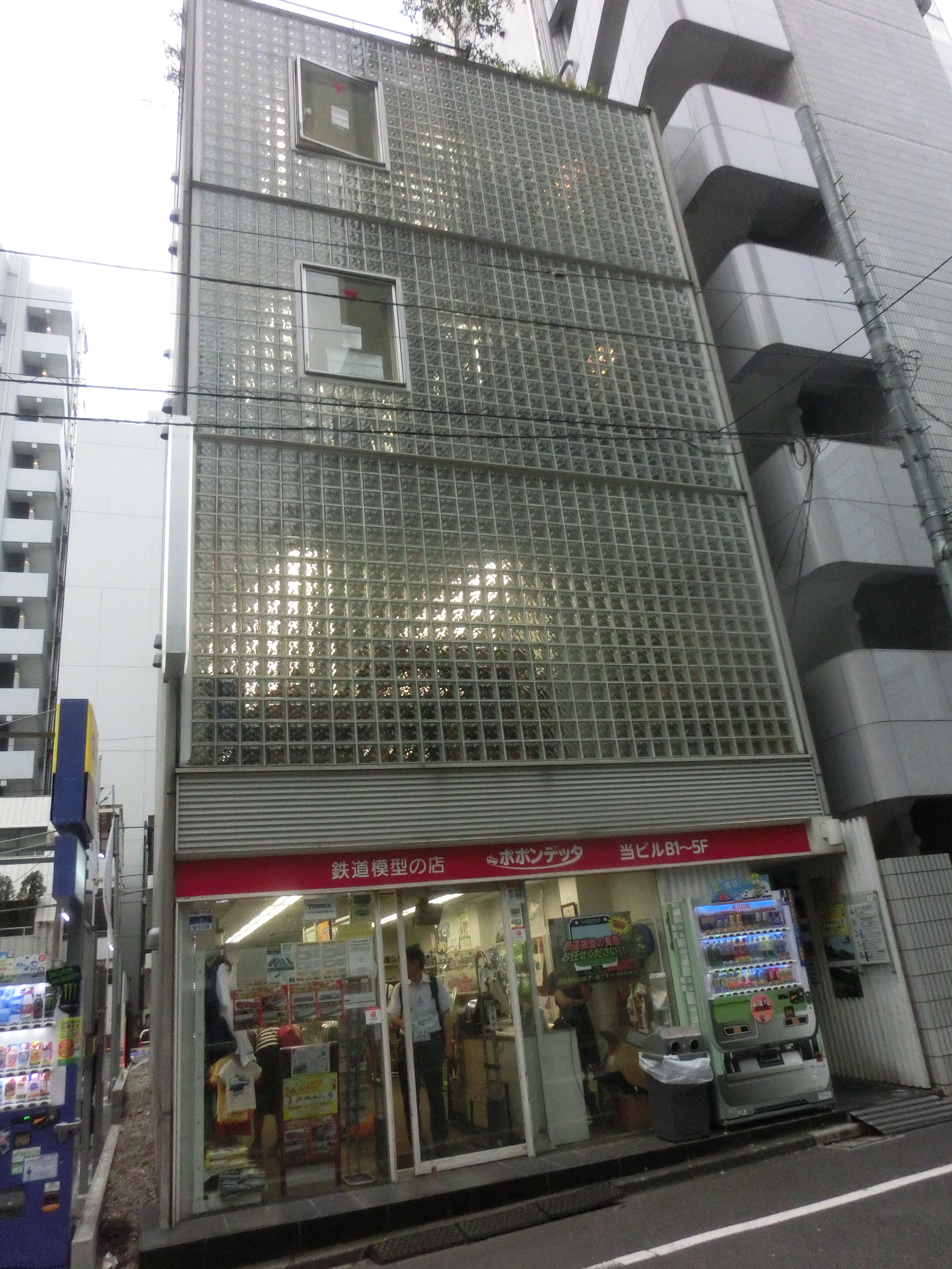 秋葉原 2019年